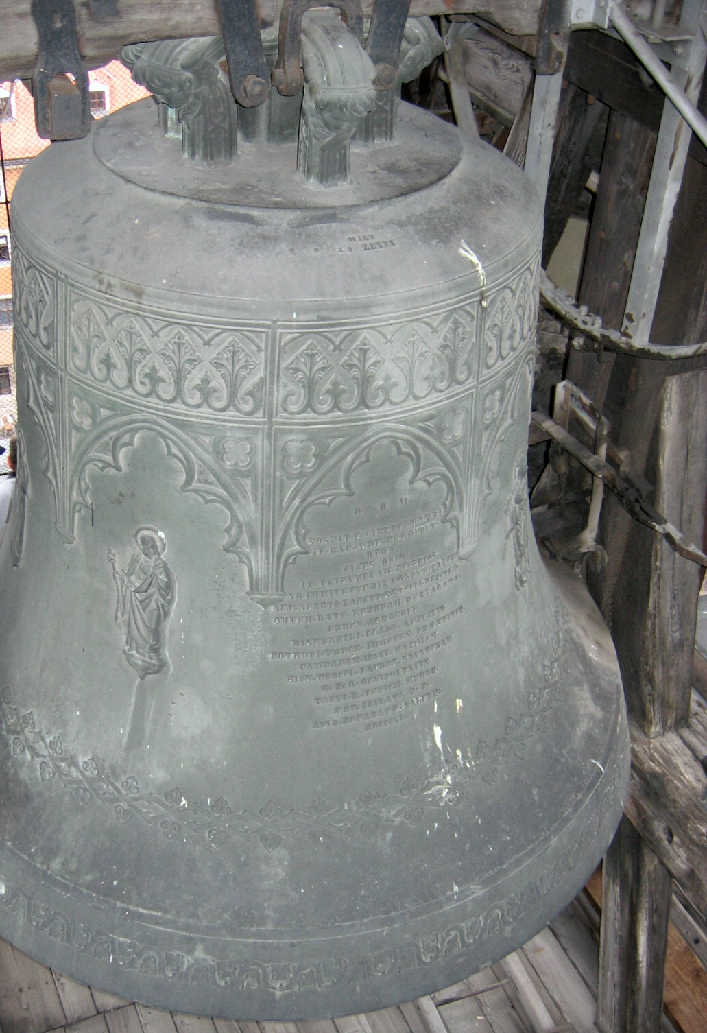 Große Glocke des Innsbrucker Domes. Ausschnitt.